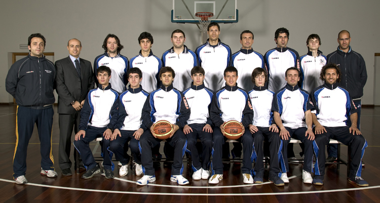 Il Team del ventennale